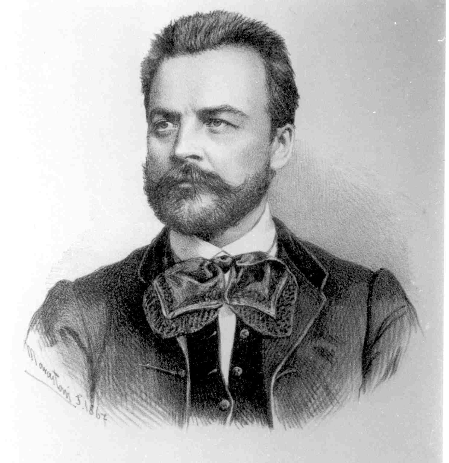 Bakody Tivadar homeopata orvos, a Nemzeti Torna Egylet szervezője és alapító tagja